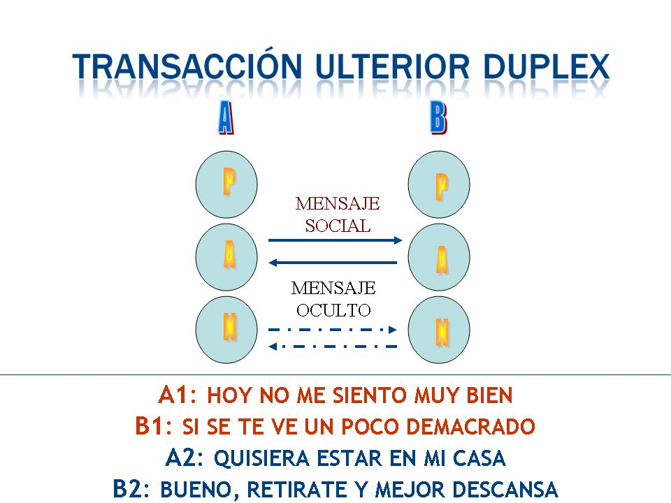 Transacción Ulterior Duplex